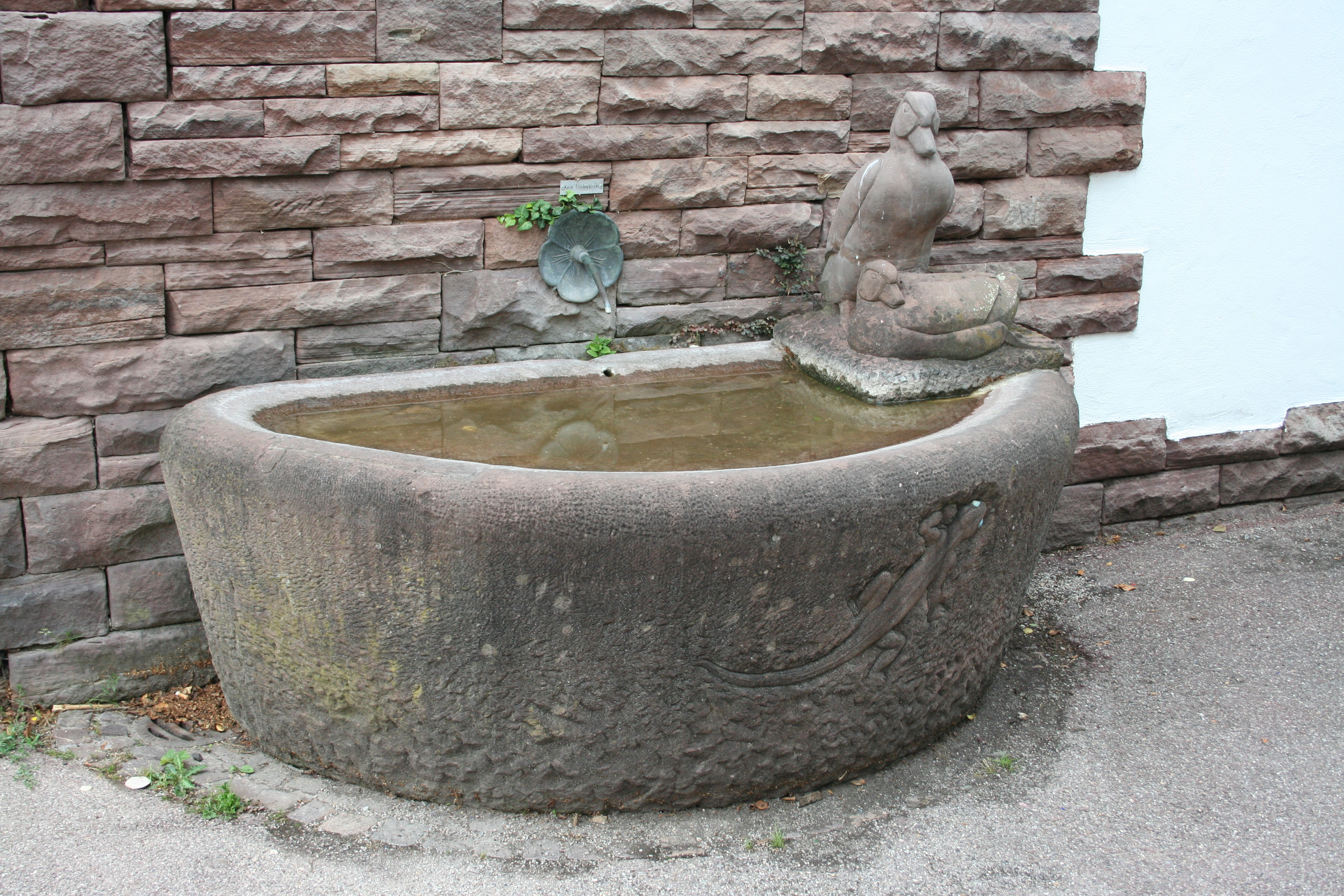 Entenbrunnen (zweigeteilt) im Höhenpark Killesberg in Stuttgart, Baden-Württemberg, Deutschland. Geschaffen 1939 aus dem Werkstoff Sandstein vom Künstler Rudolf Pauschinger.